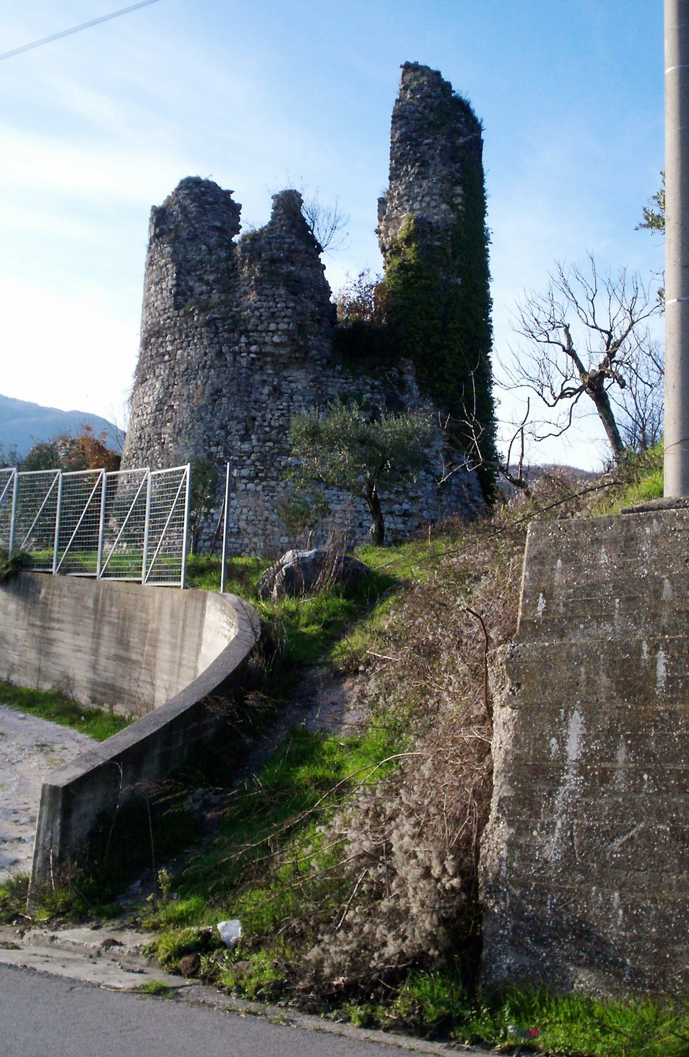 Torrione della vecchia Cerreto Sannita, distrutta dal terremoto del 5 giugno 1688.